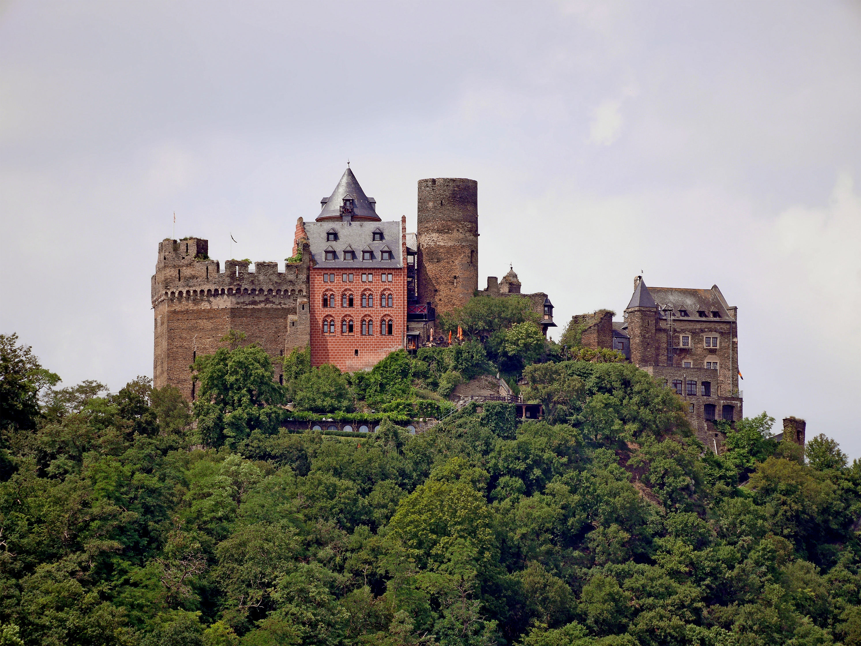 Die Schönburg, eine Höhenburg bei Oberwesel am Rhein. Baubeginn war in der 1. Hälfte des 12. Jahrhunderts. Die Burg wurde wie die meisten anderen Burgen im Oberen Mittelrheintal Pfälzischen Erbfolgekrieg 1689 von den Franzosen zerstört. In den Jahren 1885 bis 1901 wurde die Burg teilweise Wiederaufgebaut. Der nördliche Teil wurde 1951 bis 1953 als Jugendburg des Kolpingwerkes gebaut. Der südliche Teil wurde 1957 zum Hotel ausgebaut.